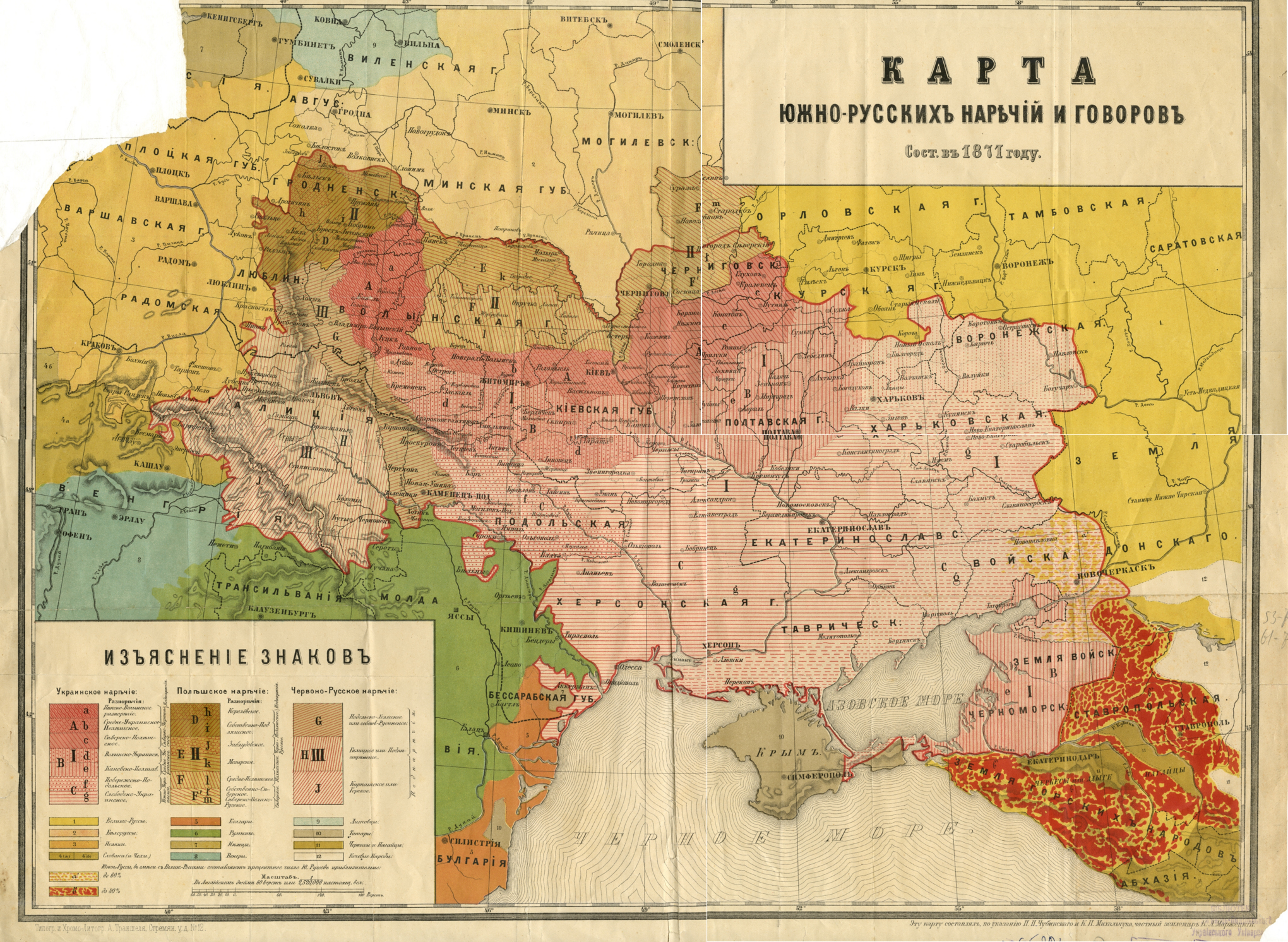 Надрукувала «Типография и Хромо-Литография А. Траншеля» в Санкт-Петербургу у 1871 році. Карта перебуває у фонді залу картографії Національної бібліотеки ім. Вернадського.